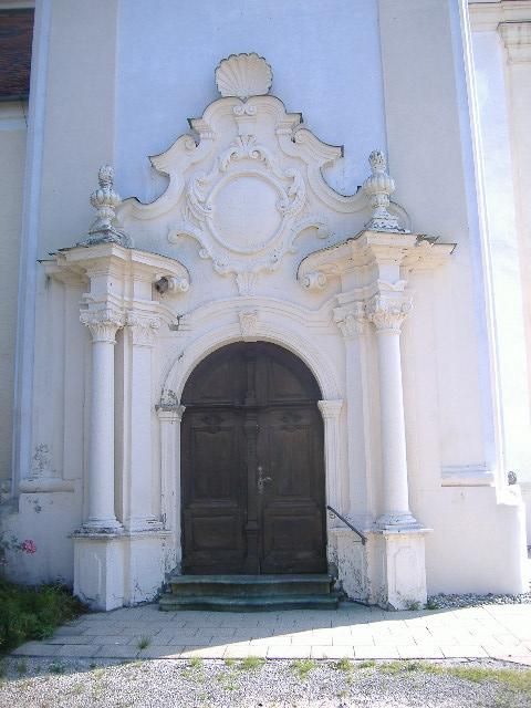 Unterliezheim